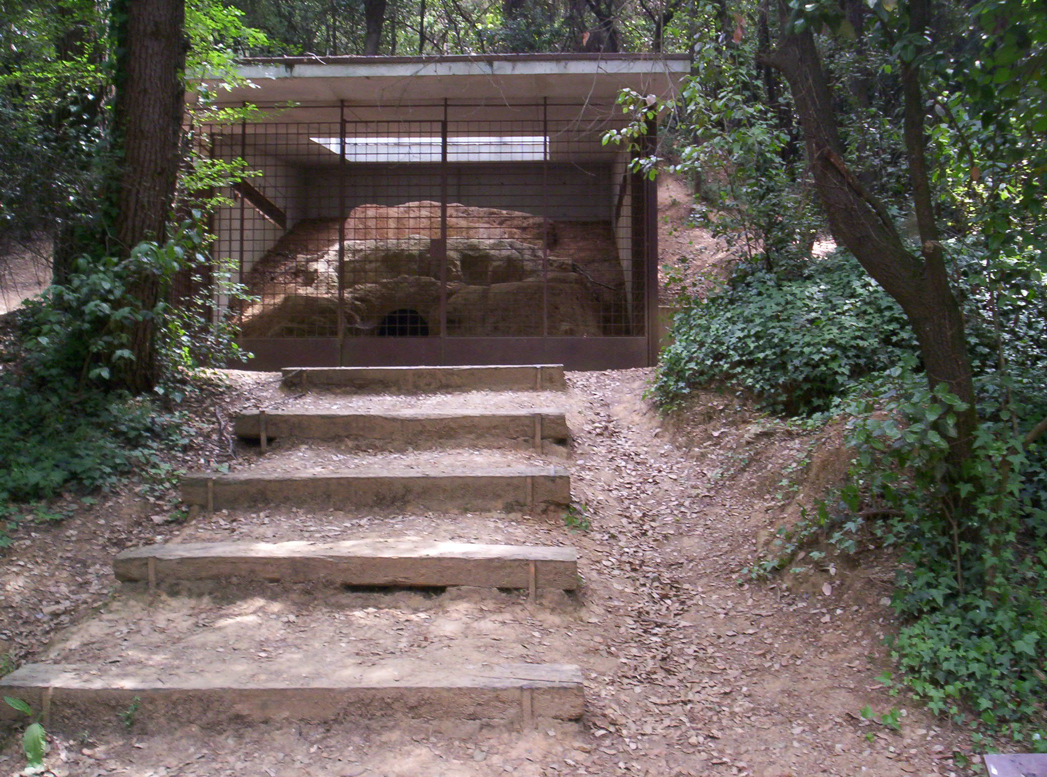 Forn Ibèric a Sant Cugat del Vallés, Vallès Oriental, (Catalunya).